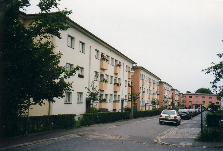 Richard-Rösch-Straße in der Großsiedlung Dresden-Trachau. Architekt: Hans Waloschek.